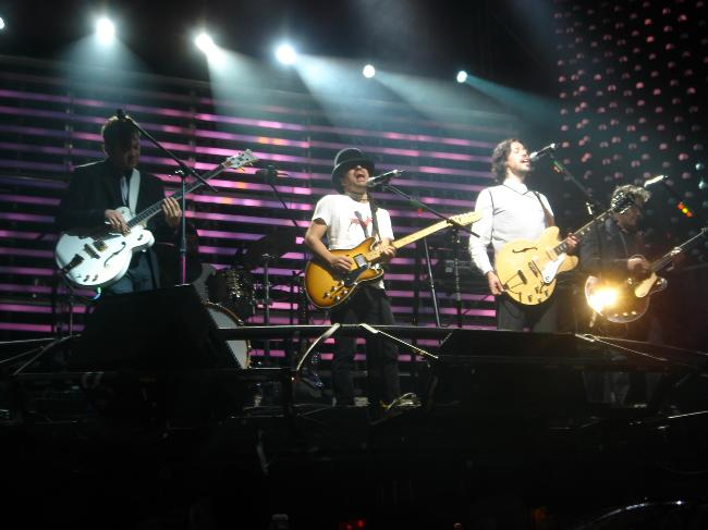 Café Tacvba en concierto en Bulldog Café, México, Distrito Federal.